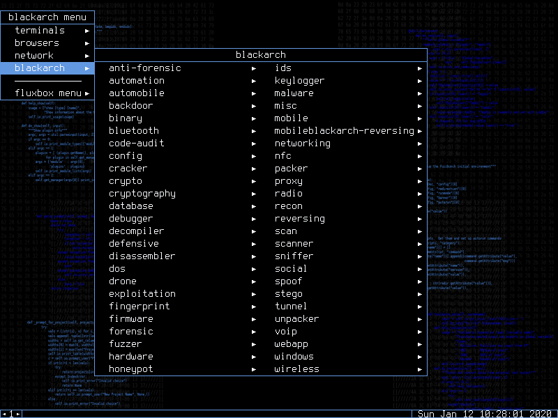 Die Tools unter BlackArch Linux.